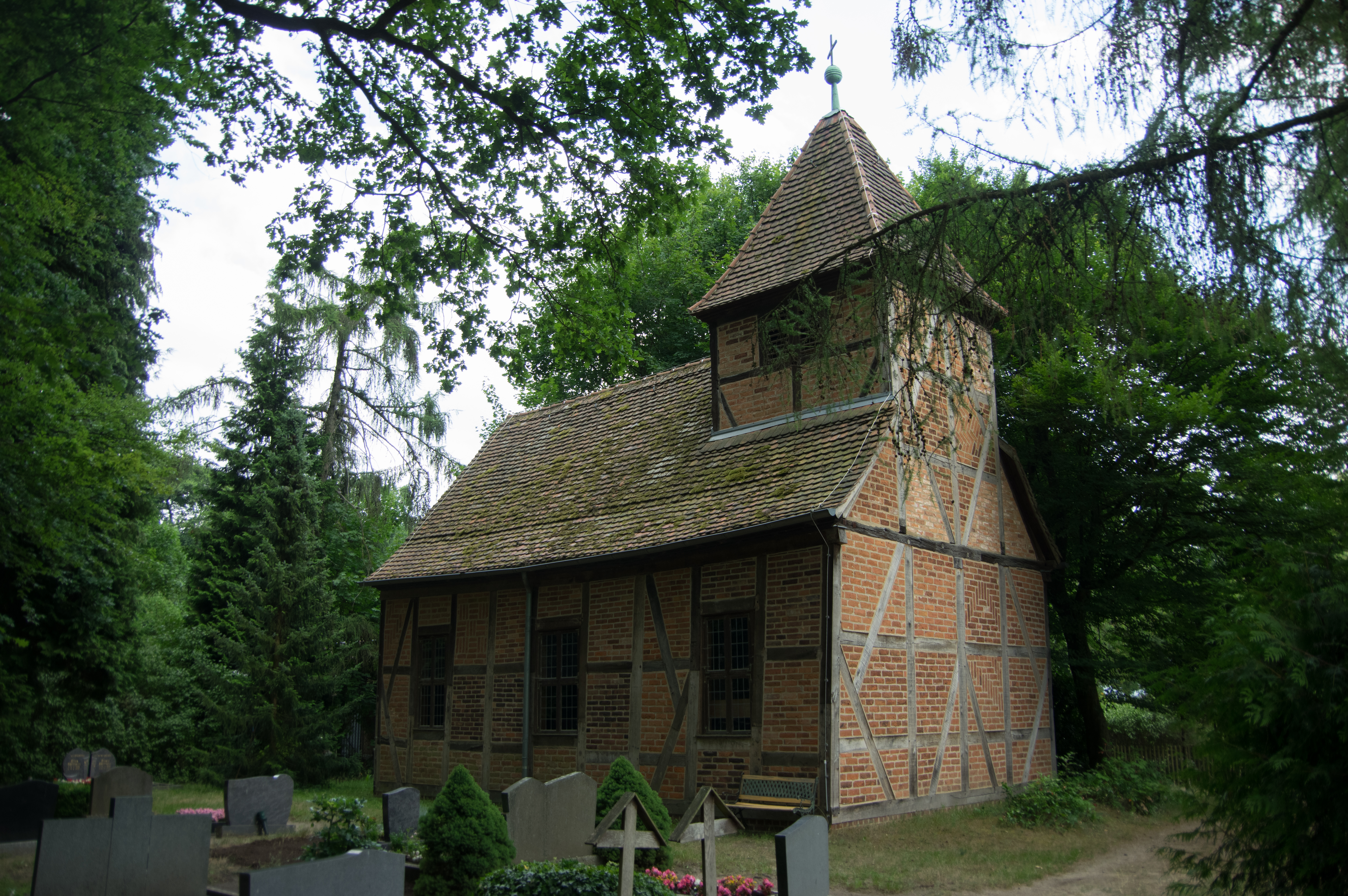 Gräben, Ortsteil Dahlen in Brandenburg.